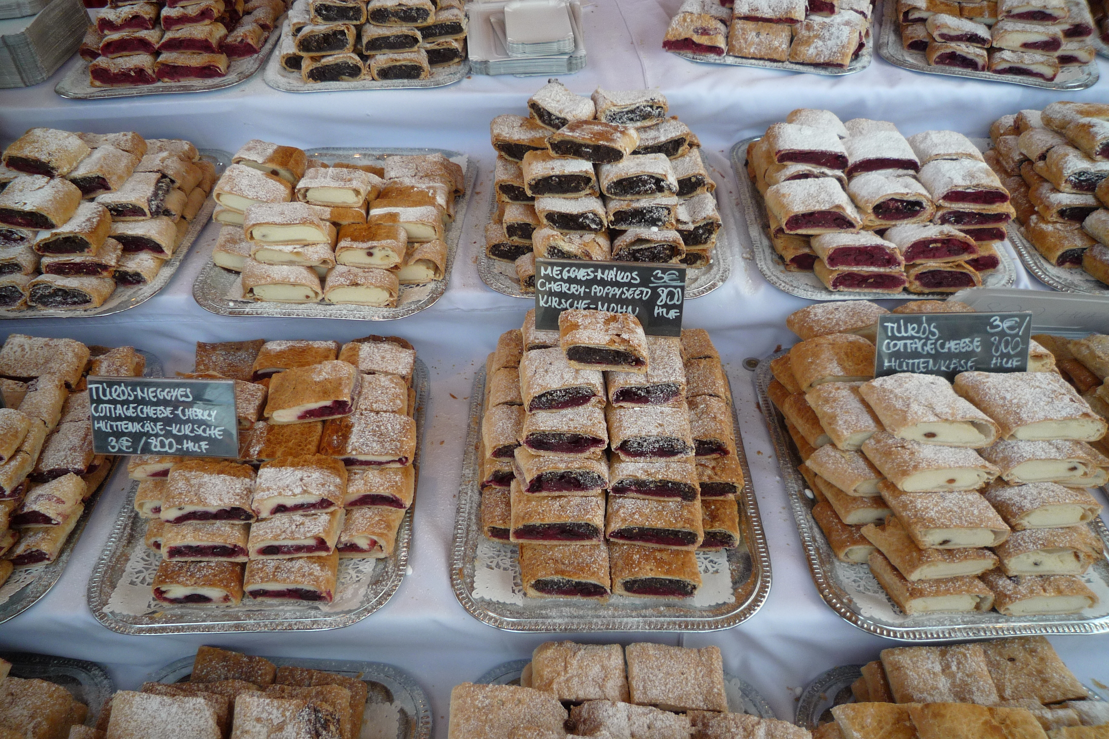 Rétesek a budai Mesterségek Ünnepén.